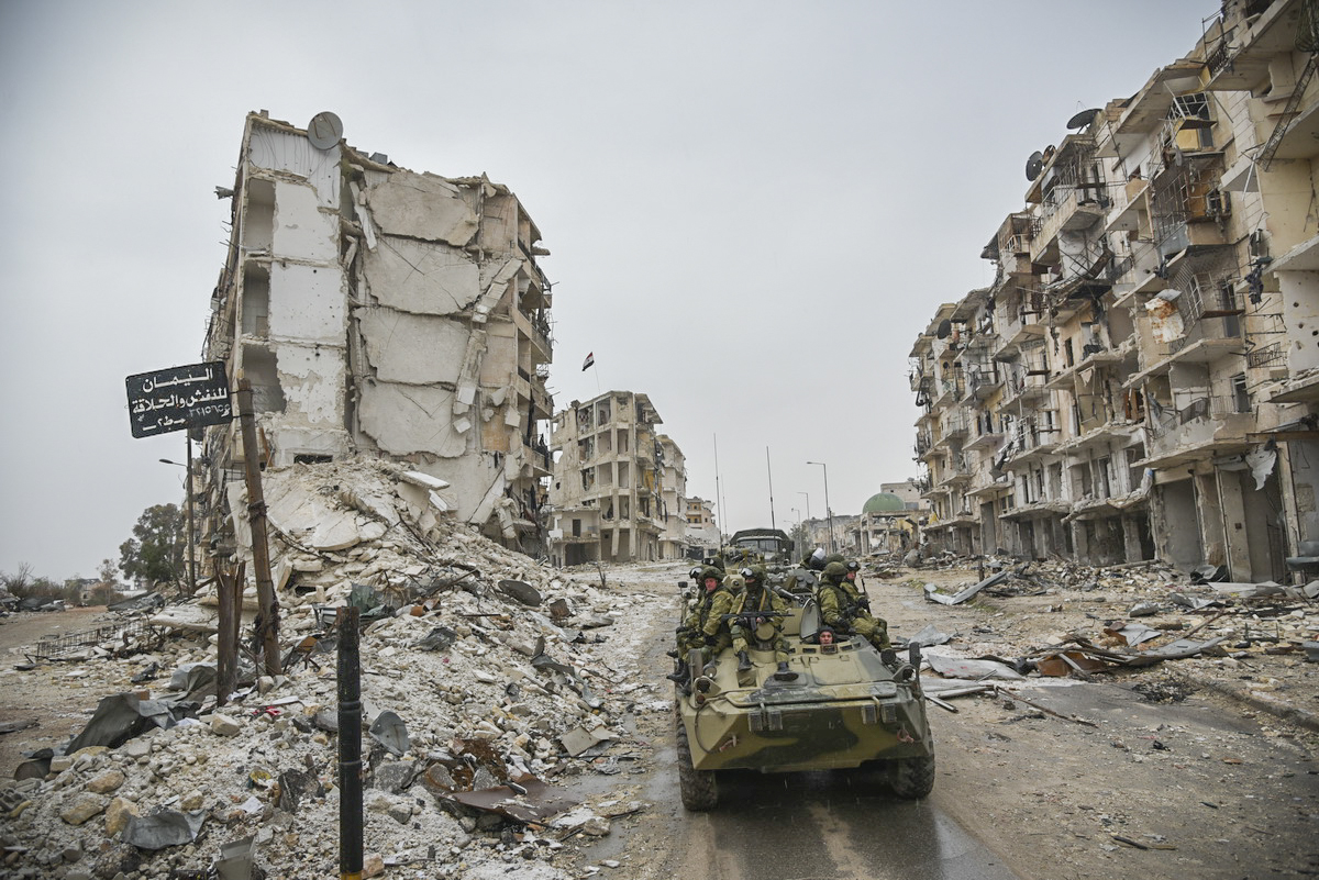 Работа сапёров Международного противоминного центра Министерства обороны России в Алеппо (Сирия)